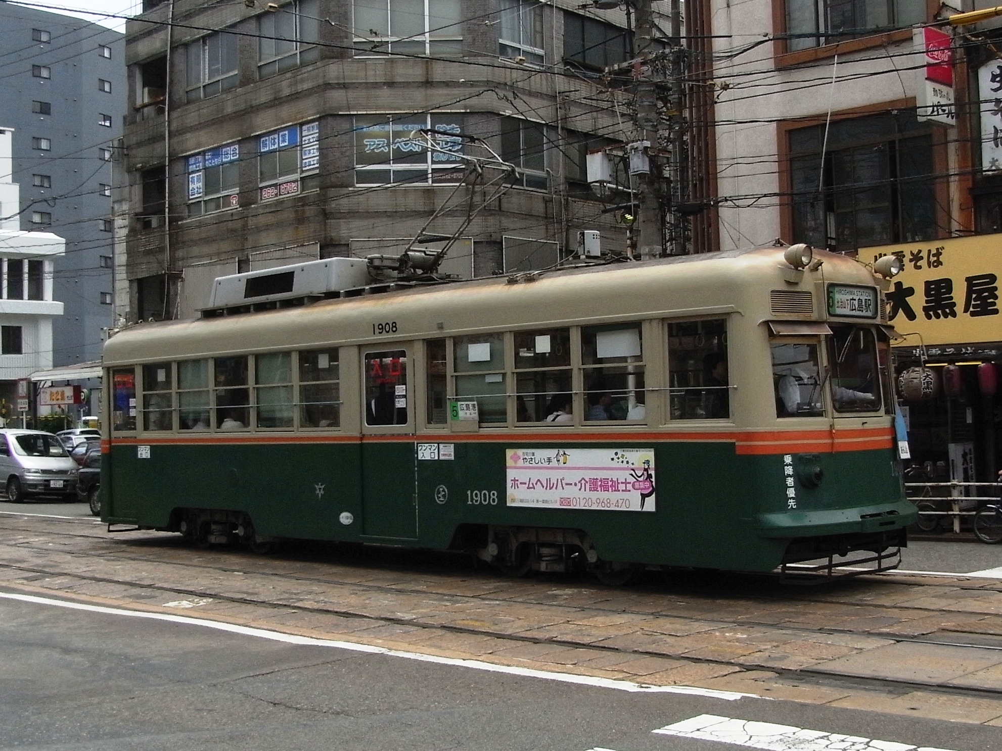 Hiroden Type1900 Tram (広島電鉄1900形電車)